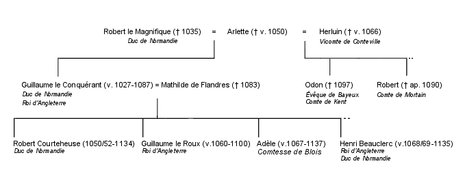 Descendance de Robert le Magnifique († 1035), duc de Normandie, sur deux générations, avec dates de naissances.